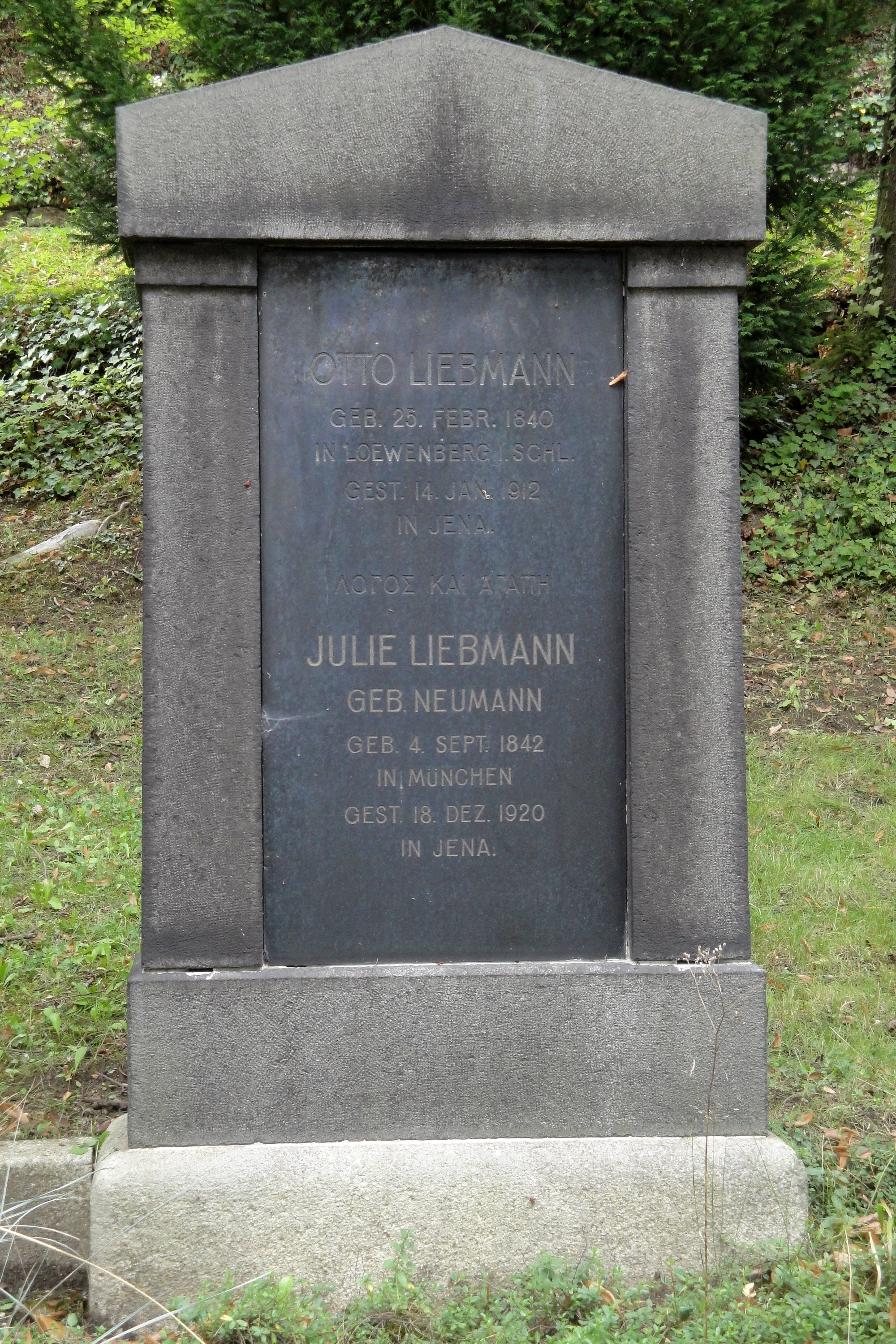 Grab von Otto Liebmann auf dem Nordfriedhof in Jena